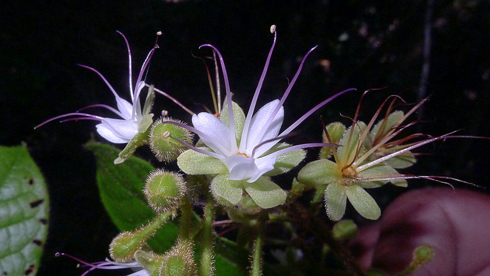 Hirtella santosii Prance